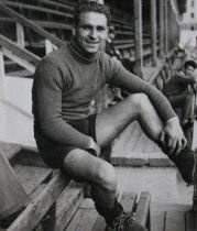 Raimundo Pérez Lezama, portero del Arenas de Getxo, Athletic de Bilbao y España